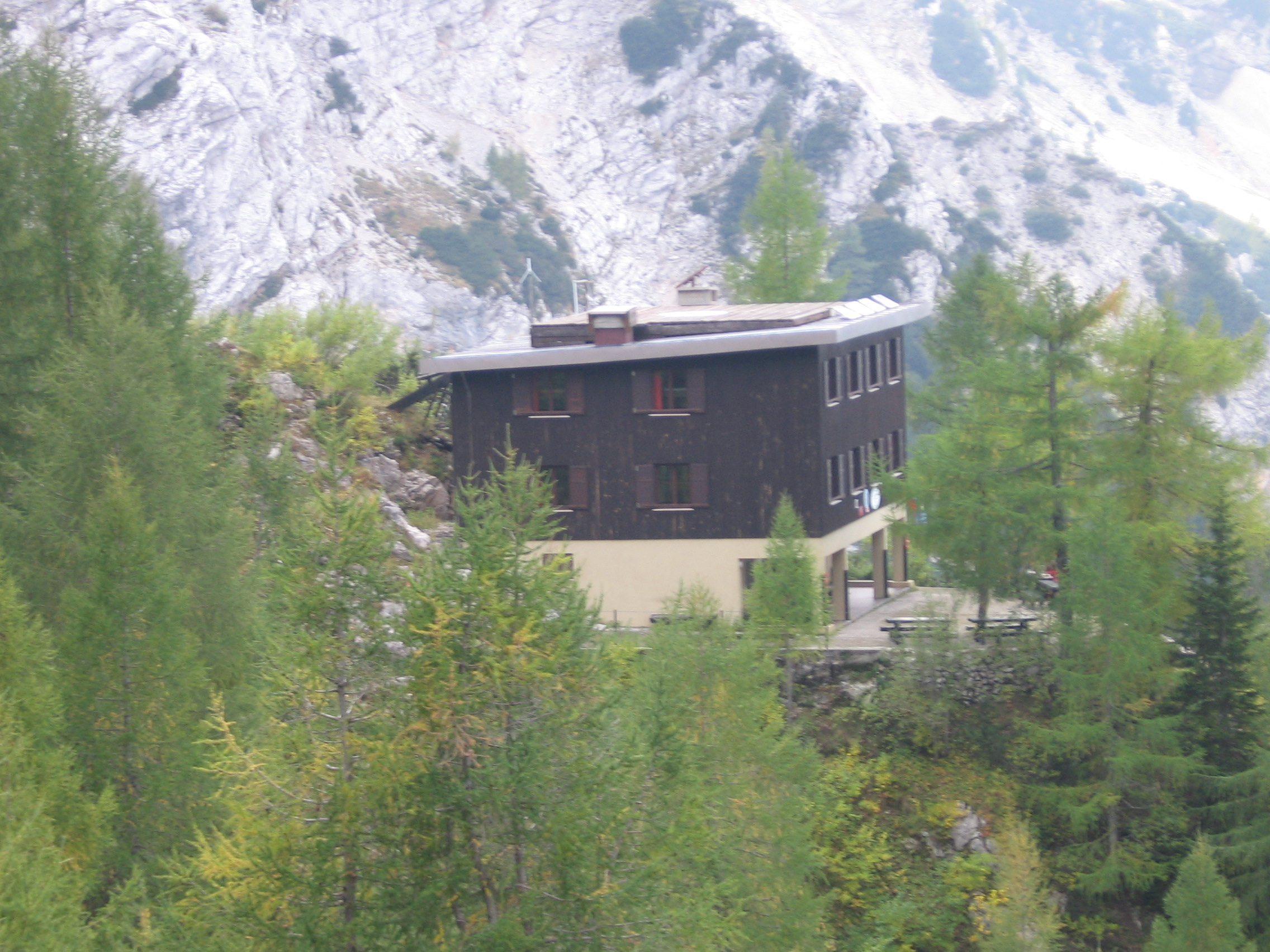 Kranj's hut on Ledine